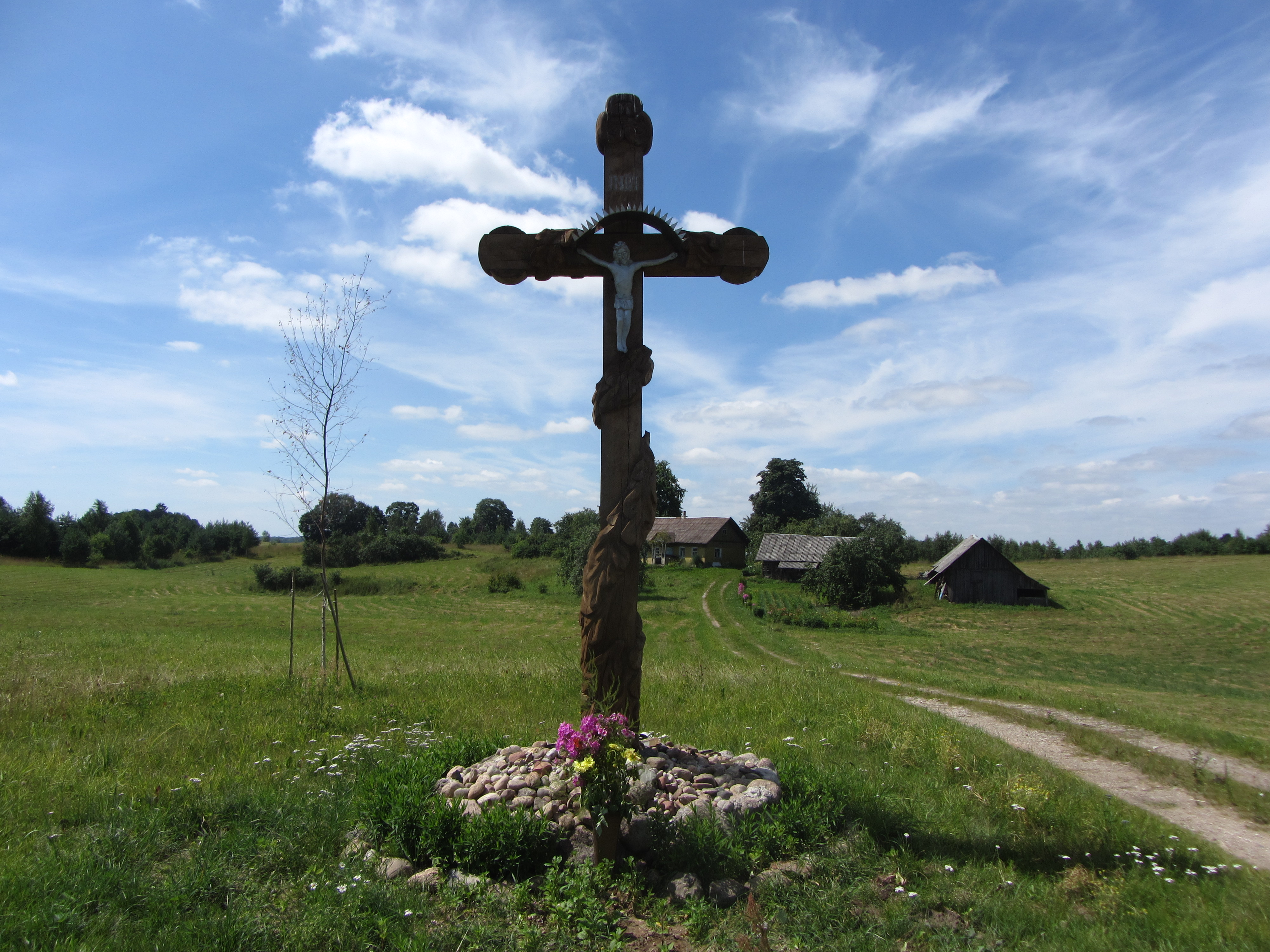 Inturkės sen., Lithuania